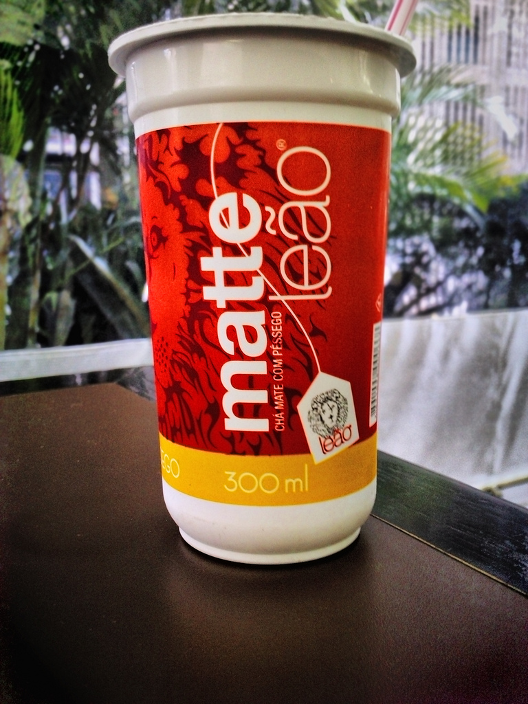 LG KF750 Secret. Macro mode.